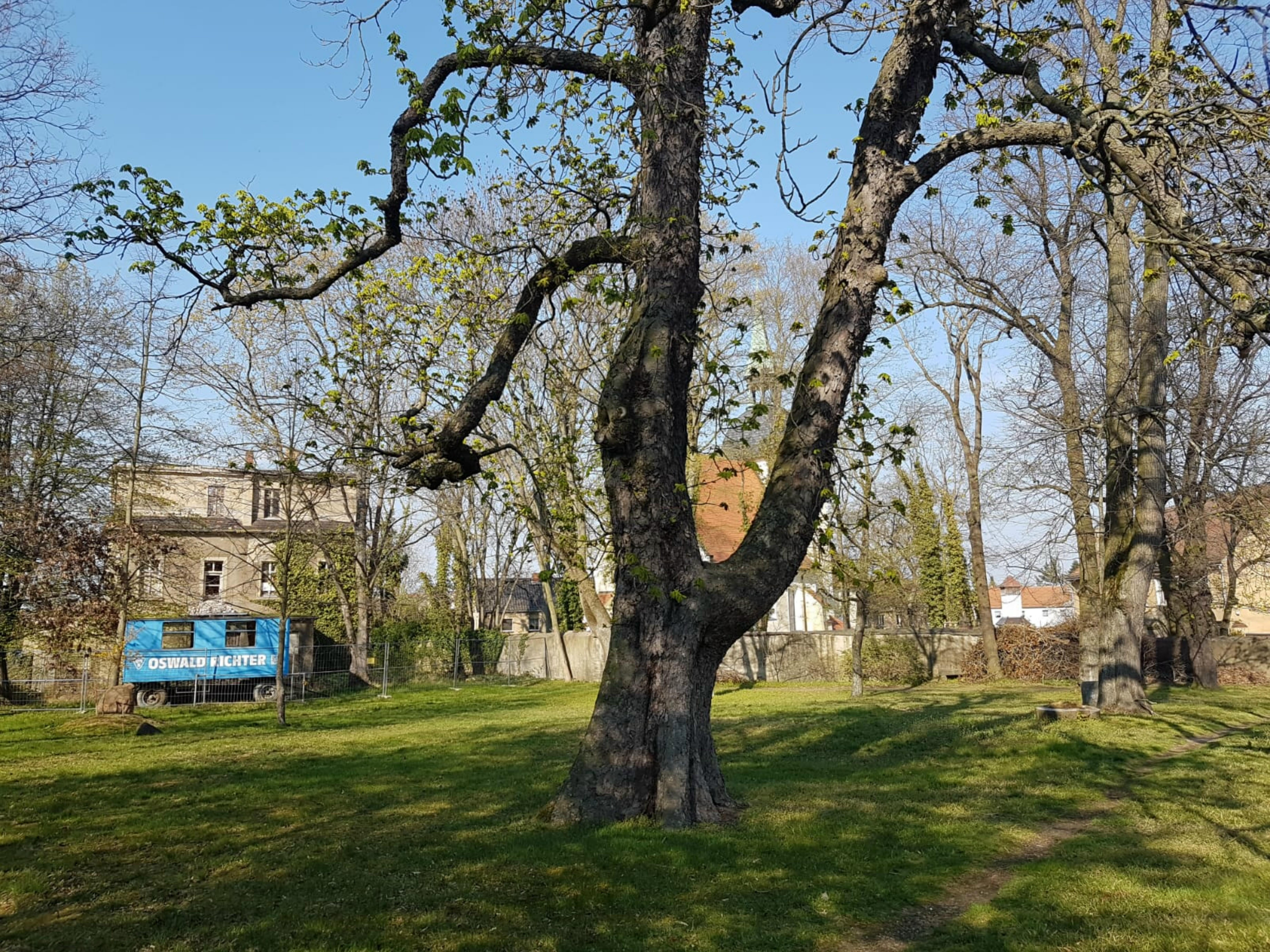 Das Herrenhaus des ehemaligen Ritterguts Burkartshain. Im Schlußstein ist das Monogramm HJM für Hans Jakob Mettler mit der Jahreszahl 1838 dem Erbauer des HH und AJ für Alfred Jakob, welcher 1912 das HH umbauen liess. Kleiner Park mit Kastanienbäumen